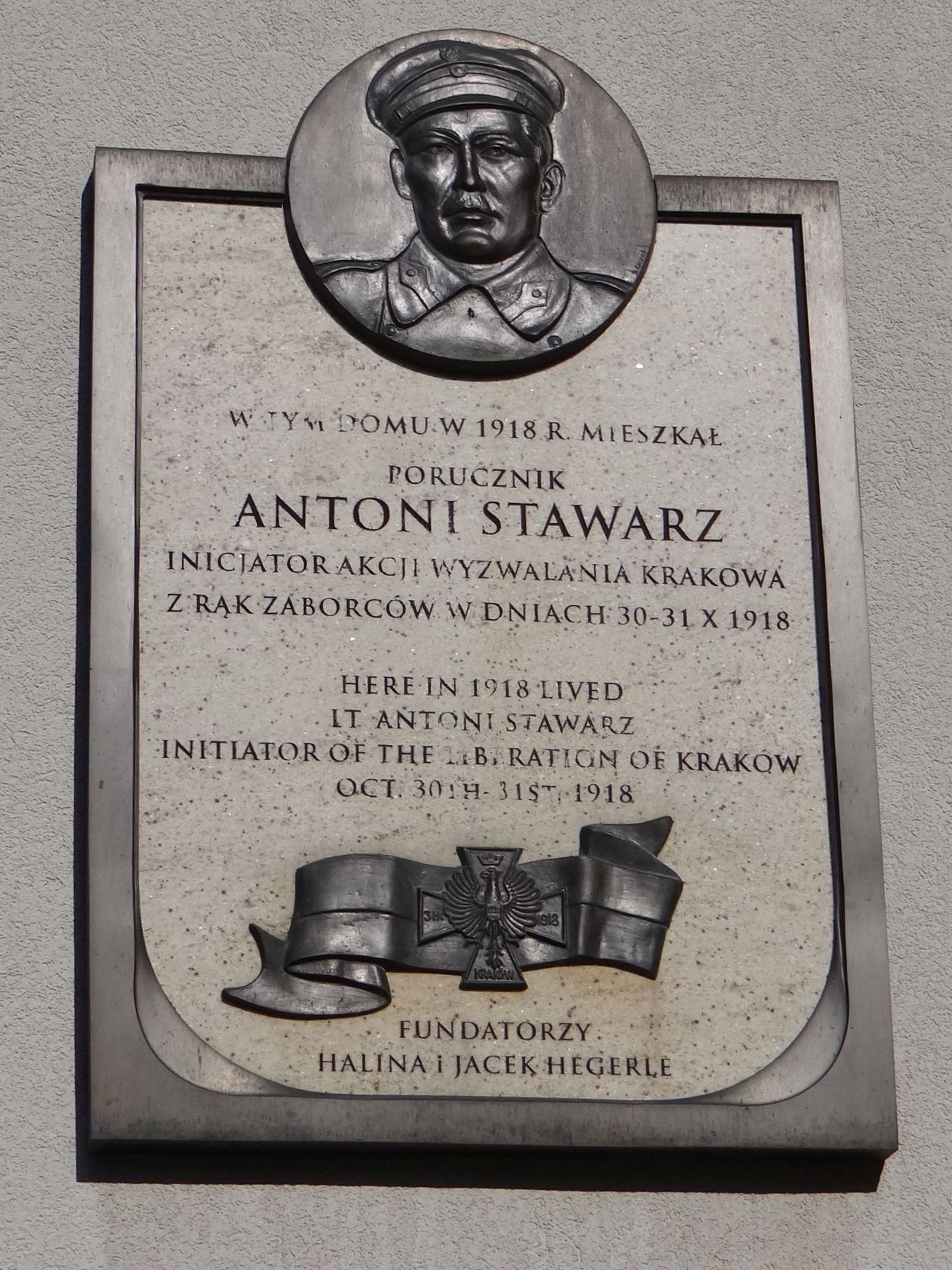 Tablica upamiętniająca Adama Stawarza na ścianie domu na Podgórzu w Krakowie